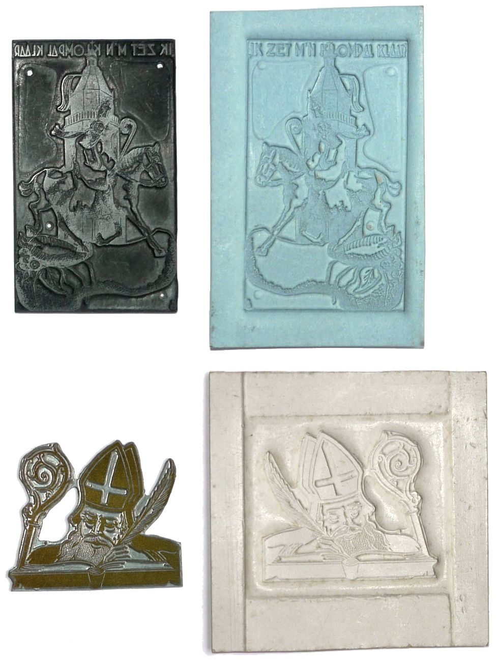 Blinddrukstempels en bijbehorende afdrukken van sinterklaasafbeeldingen